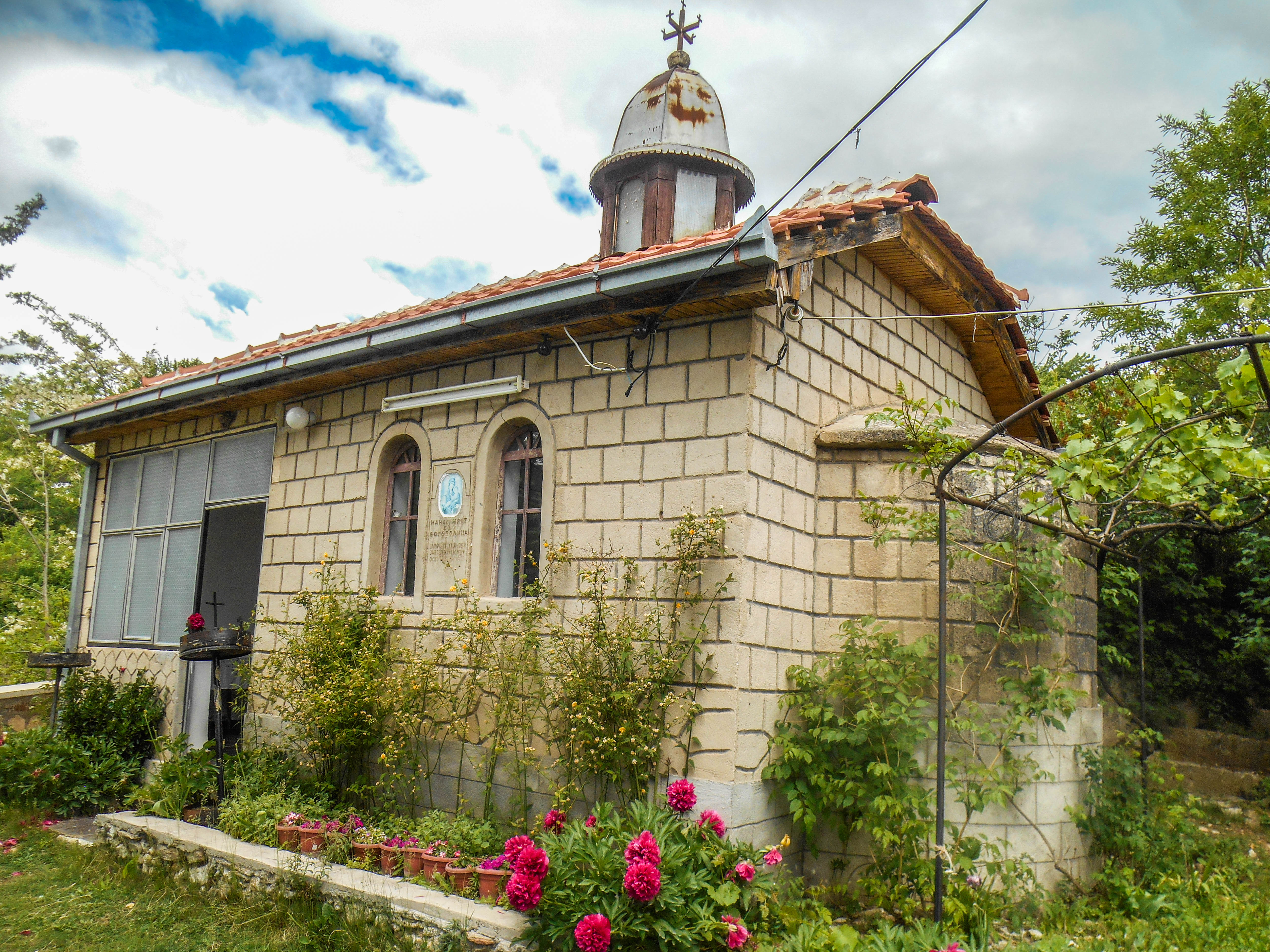 Црква „Успение на Пресвета Богородица“ - Требичино